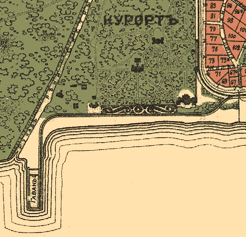 Карта Сесторецка начала ХХ века